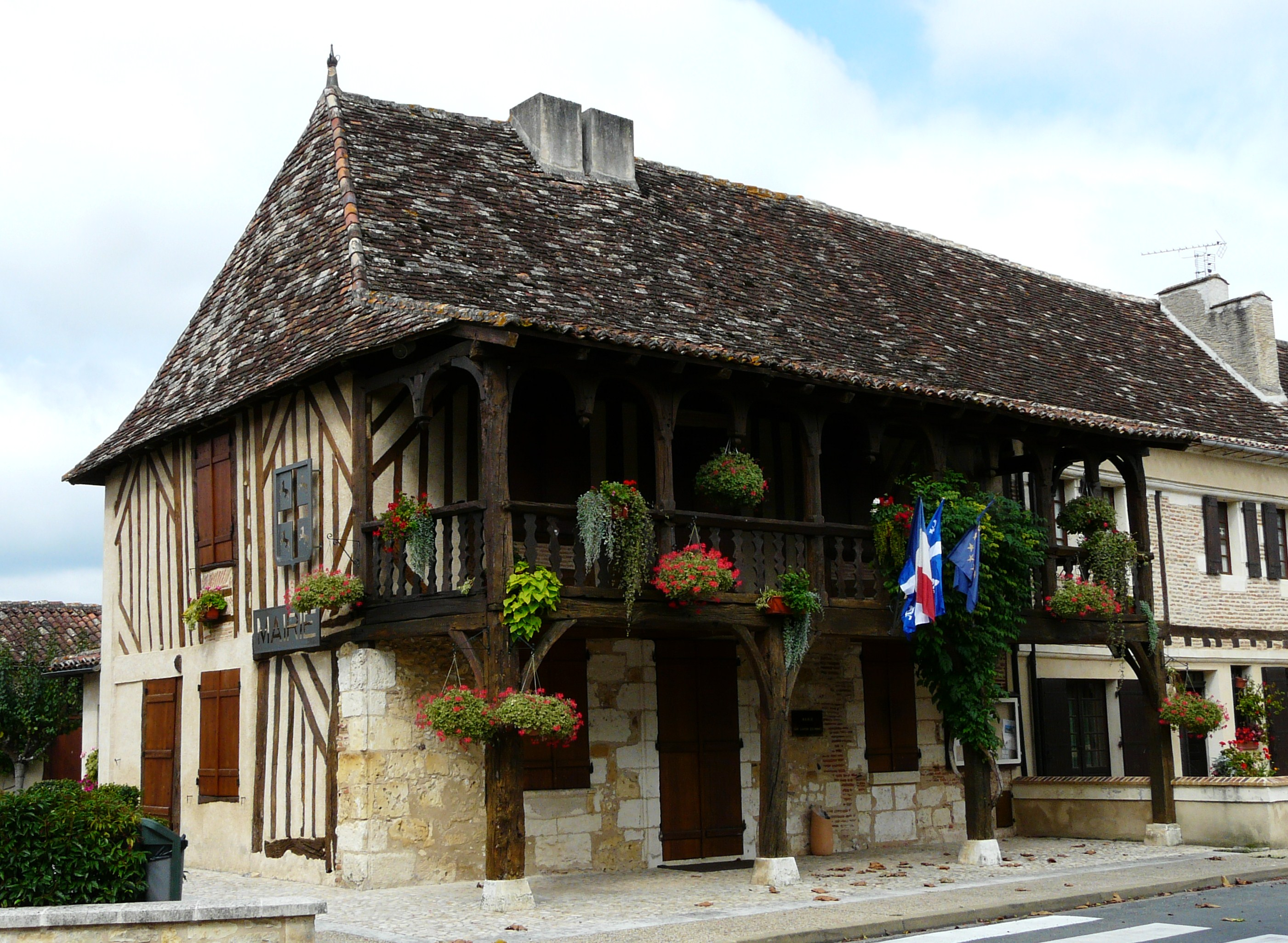 Mairie de Saint-Laurent-des-Hommes Object location45° 02′ 13.8″ N, 0° 15′ 13.1″ E .